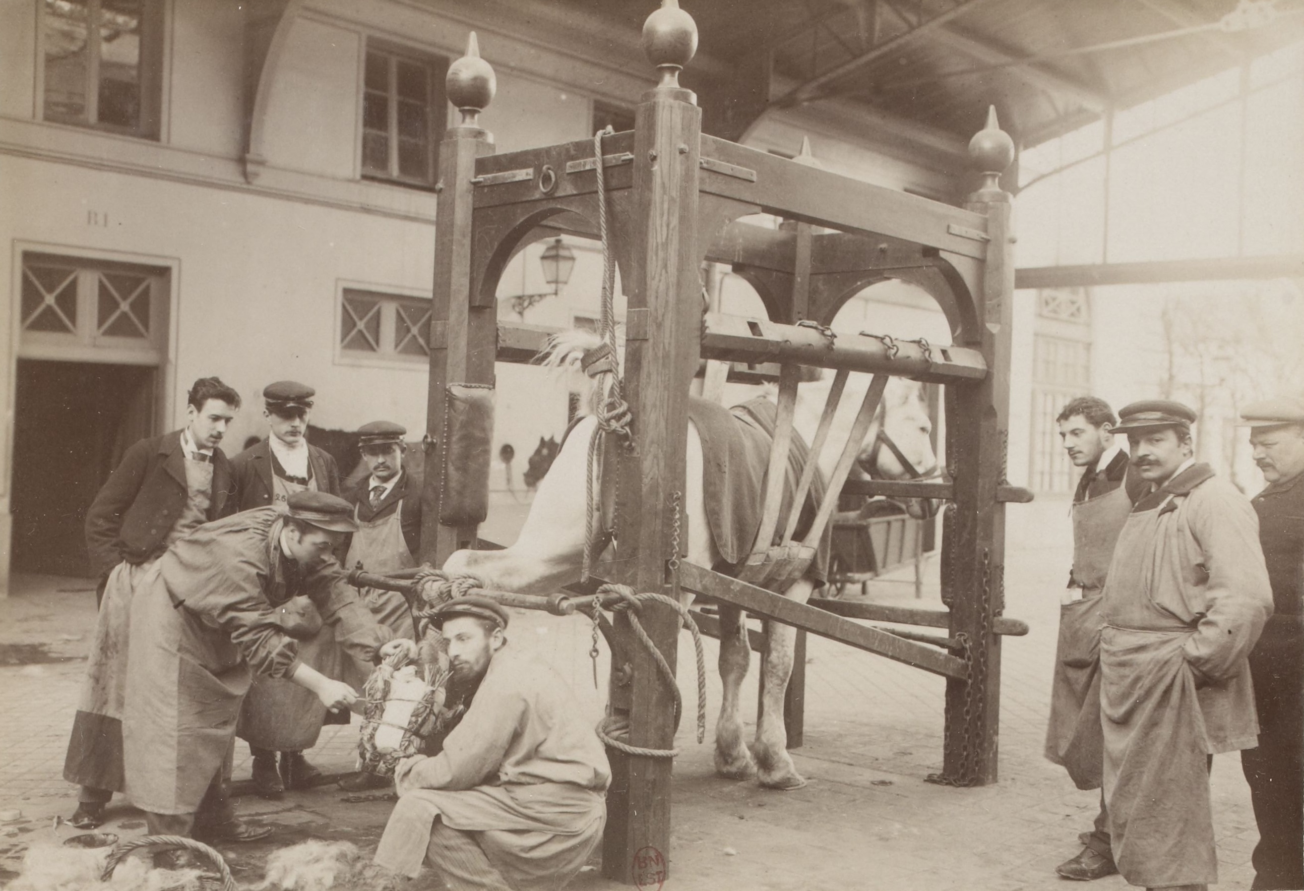 [Collection Jules Beau. Photographie sportive] : T. 8. Années 1898 et 1899 / Jules Beau : F. 18. École vétérinaire d' Alfort